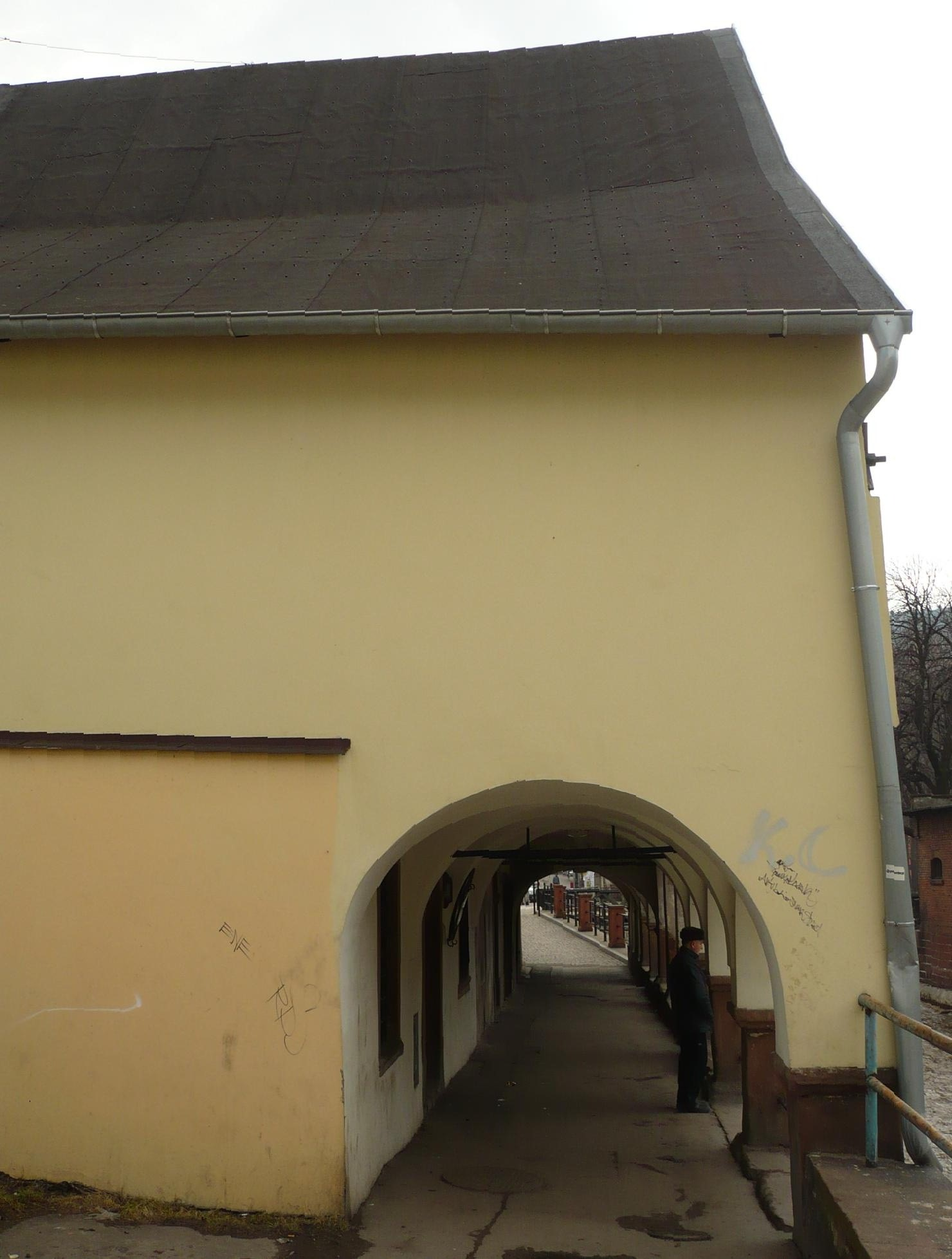 Nowa Ruda, ul. Nadrzeczna 3 - bok domu tkaczy, XVIII/XIX w., przebud. w XX w. (zabytek nr A/942/1566 z 16.03.1966)